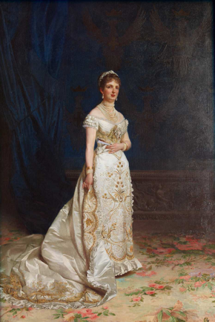 La regina Margherita di Savoia, olio su tela, Roma, Palazzo del Quirinale